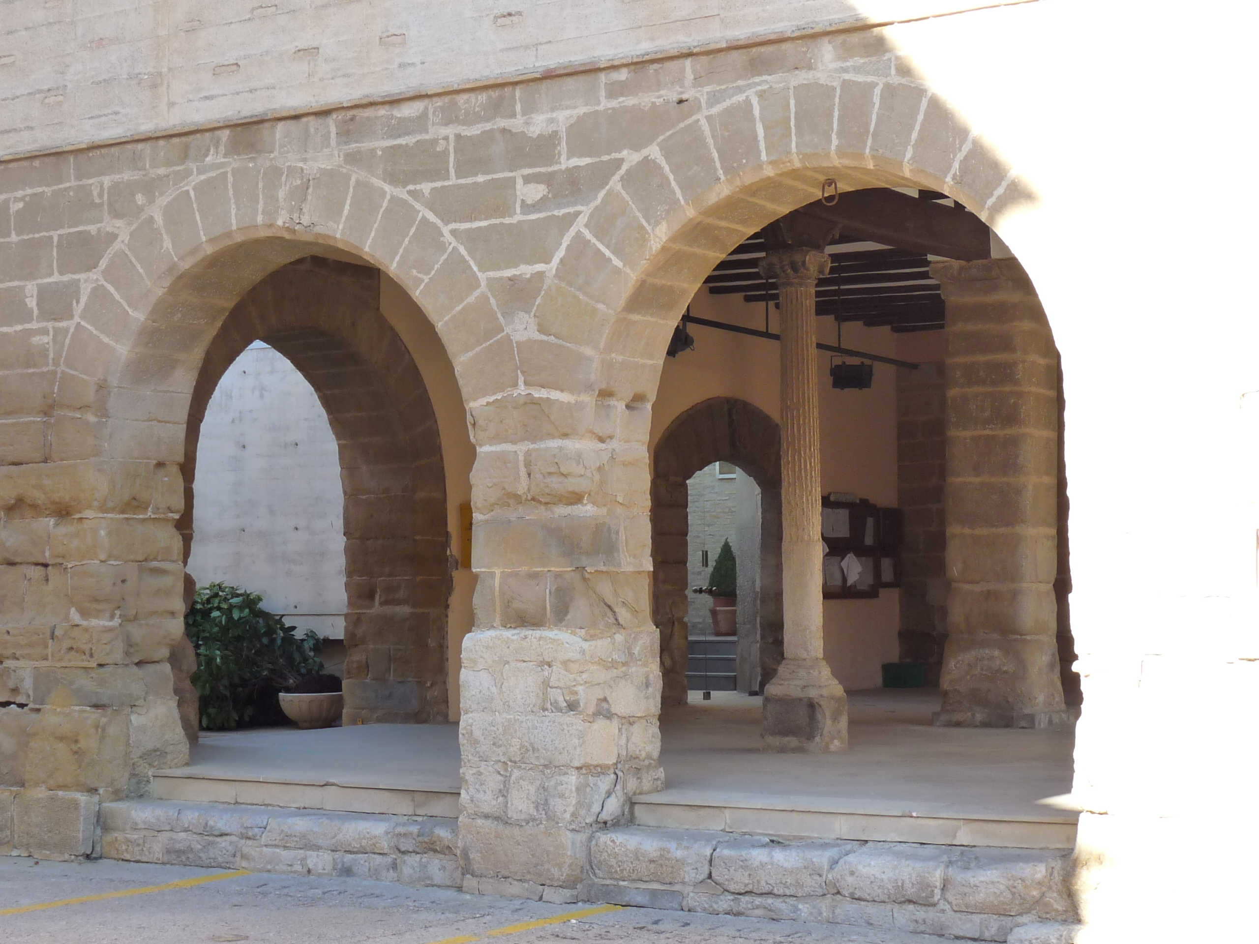 Sena - Ayuntamiento (1550-1575)